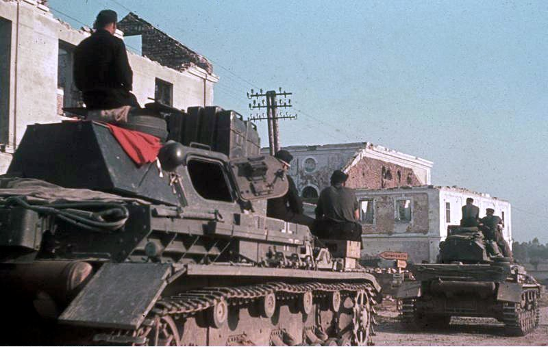 Deutsche Panzer am 21. Juni 1941 auf der Fahrt zur Front